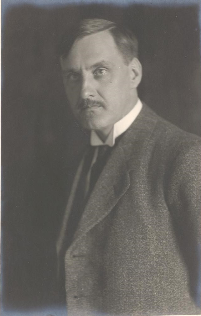 Franz Schmelhaus: Porträt von Hans Eduard Fierz, 1924. Fotografie : Silbergelatineabzug ; 14,8 x 9,6 cm. Zentralbibliothek Zürich, AWQ 9004.